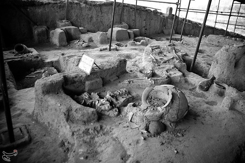 مازِرونی: گوهرتپه‌یِ شیش‌هزار ساله تمدن ِآثار